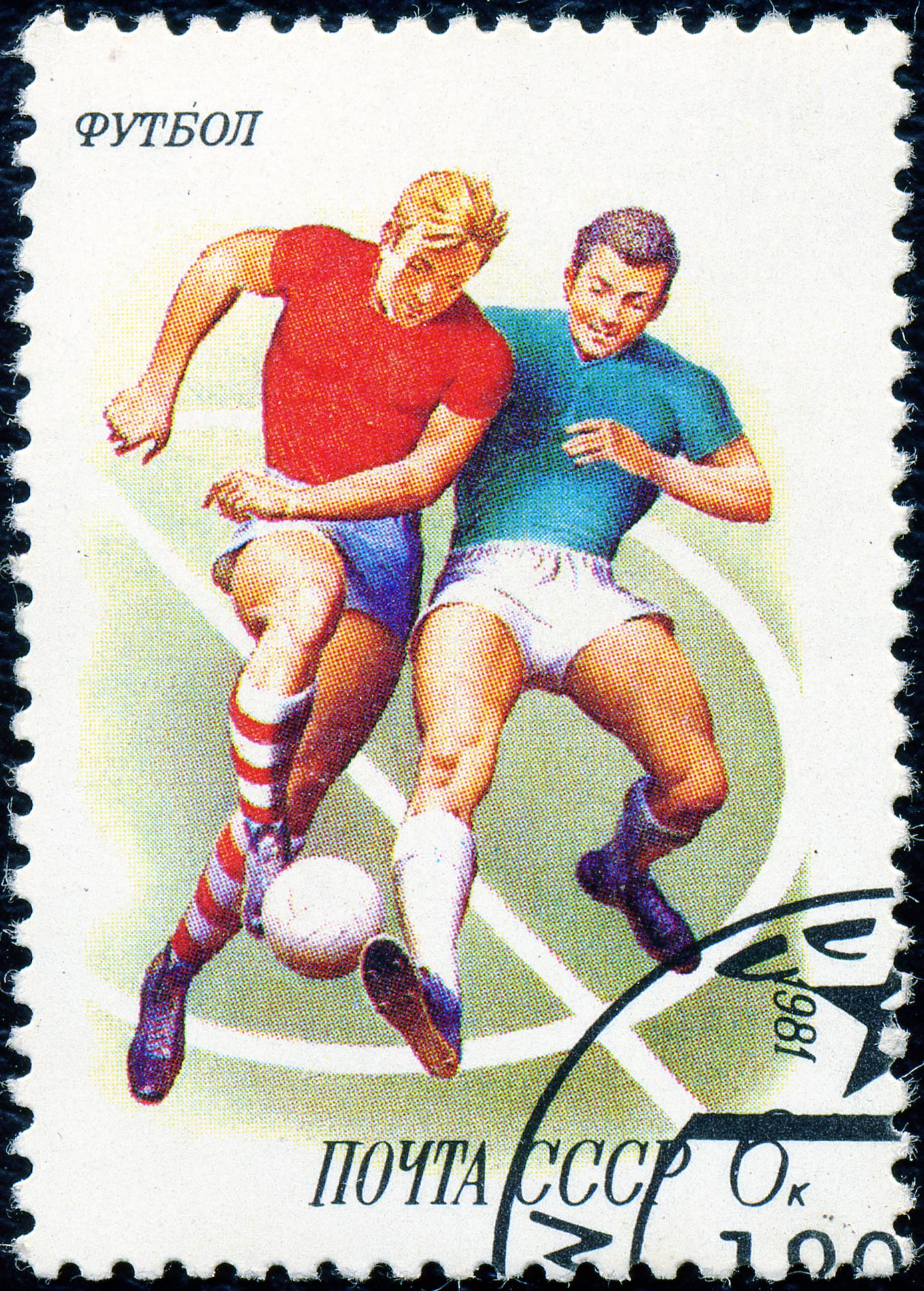 Почтовая марка СССР. 1981. Футбол